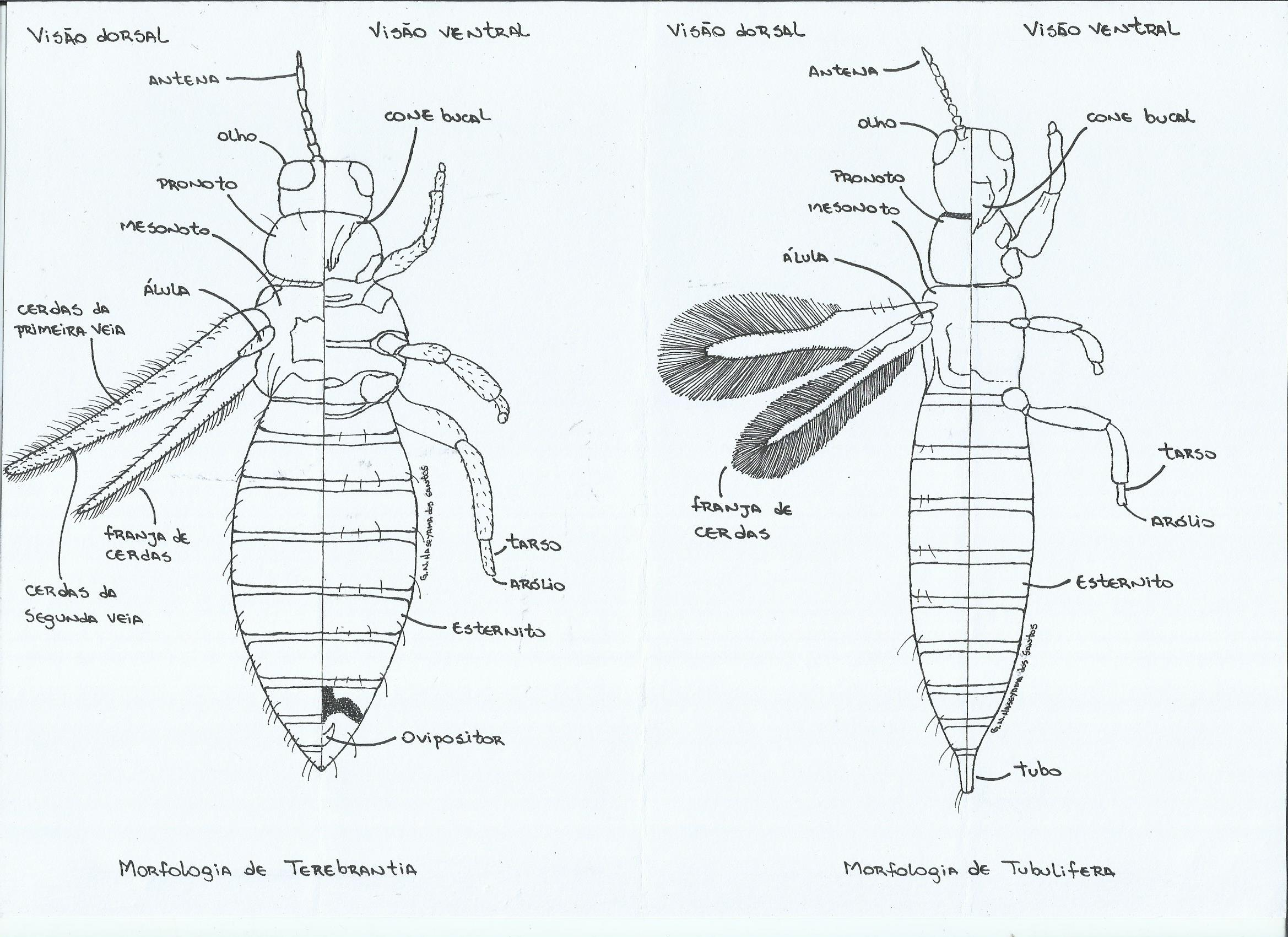 Esquema de Thysanoptera Terebrantia e Thysanoptera Tubulifera (visão dorsal e ventral), baseado em MONTEIRO, Renata C; MOUND, Laurence A (2012). Thysanoptera. Ribeirão Preto: Holos. Insetos do Brasil: diversidade e taxonomia.